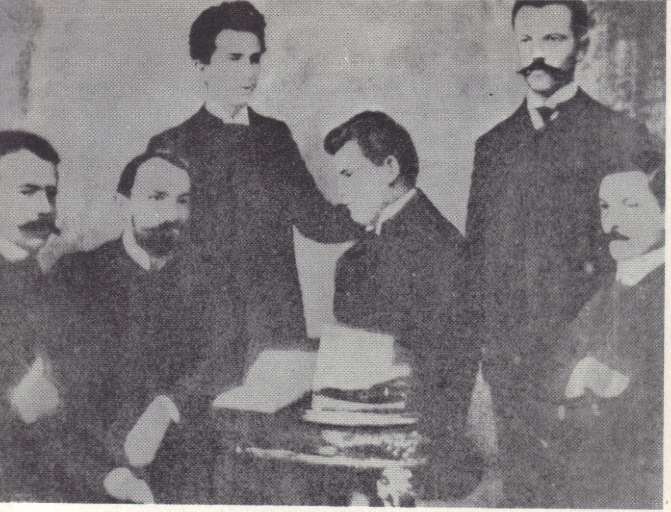 Mihail Sadoveanu împreună cu I. Scurtu, Ilarie Chendi și Șt. O. Iosif (rândul de jos), V. Pârvan și Al. Lapedatu (rândul de sus). Fotografie executată după un clișeu existent la Muzeul de literatură al Moldovei din Iași.